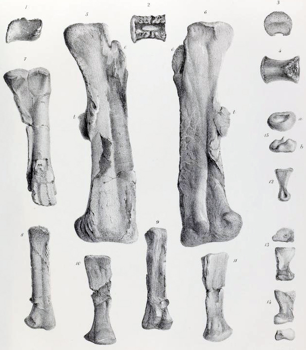 Bones of a juvenile Scelidosaurus.